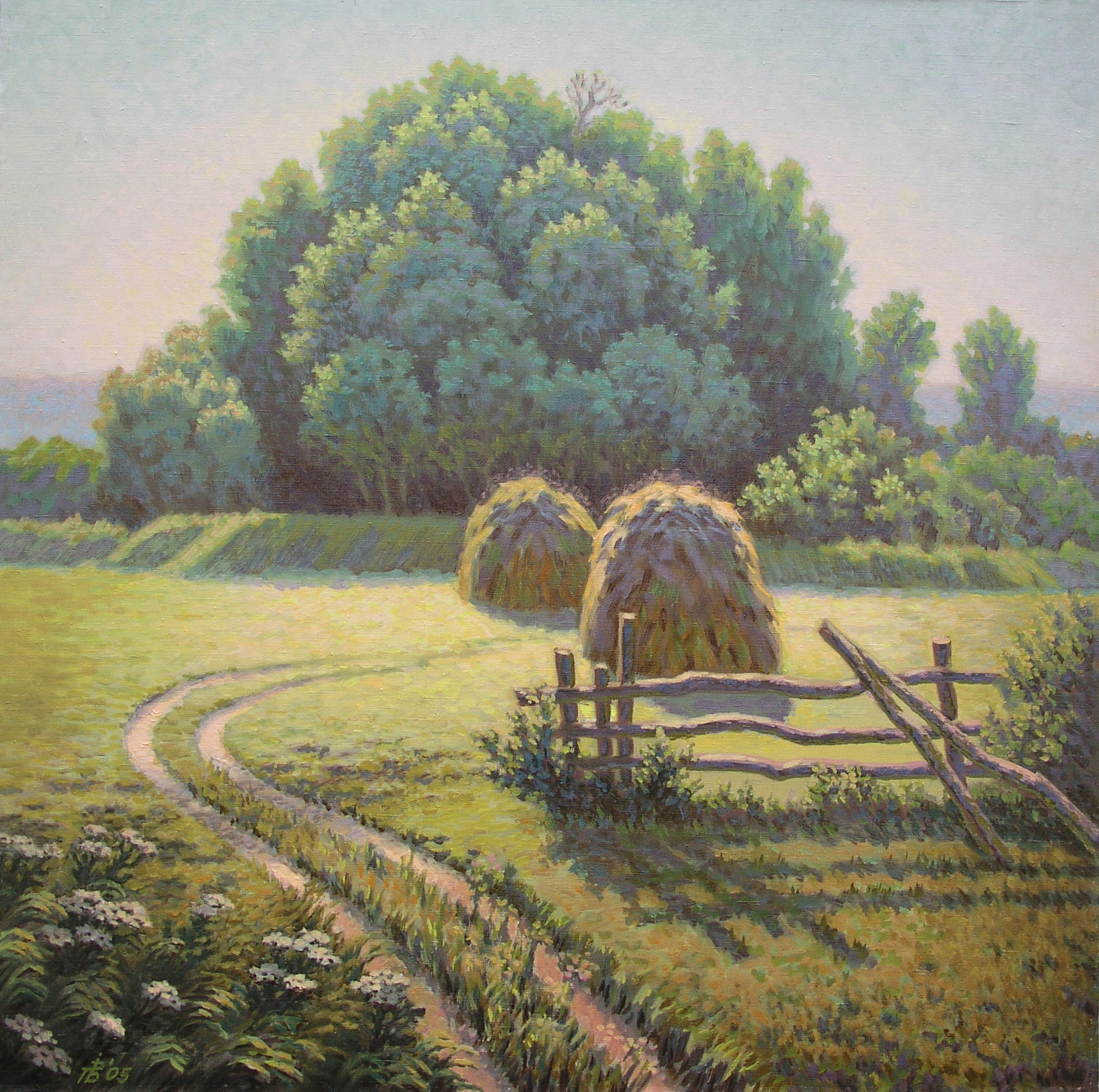 Робота Волика Павла Івановича